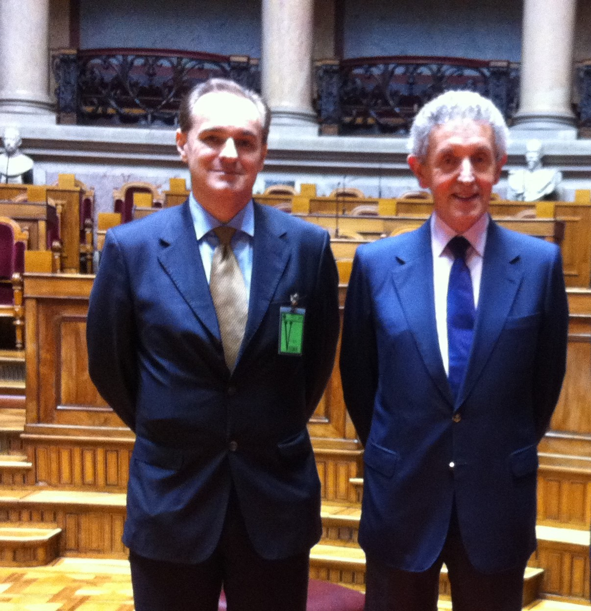 Helder Antunes e João Bosco Mota Amaral na AR